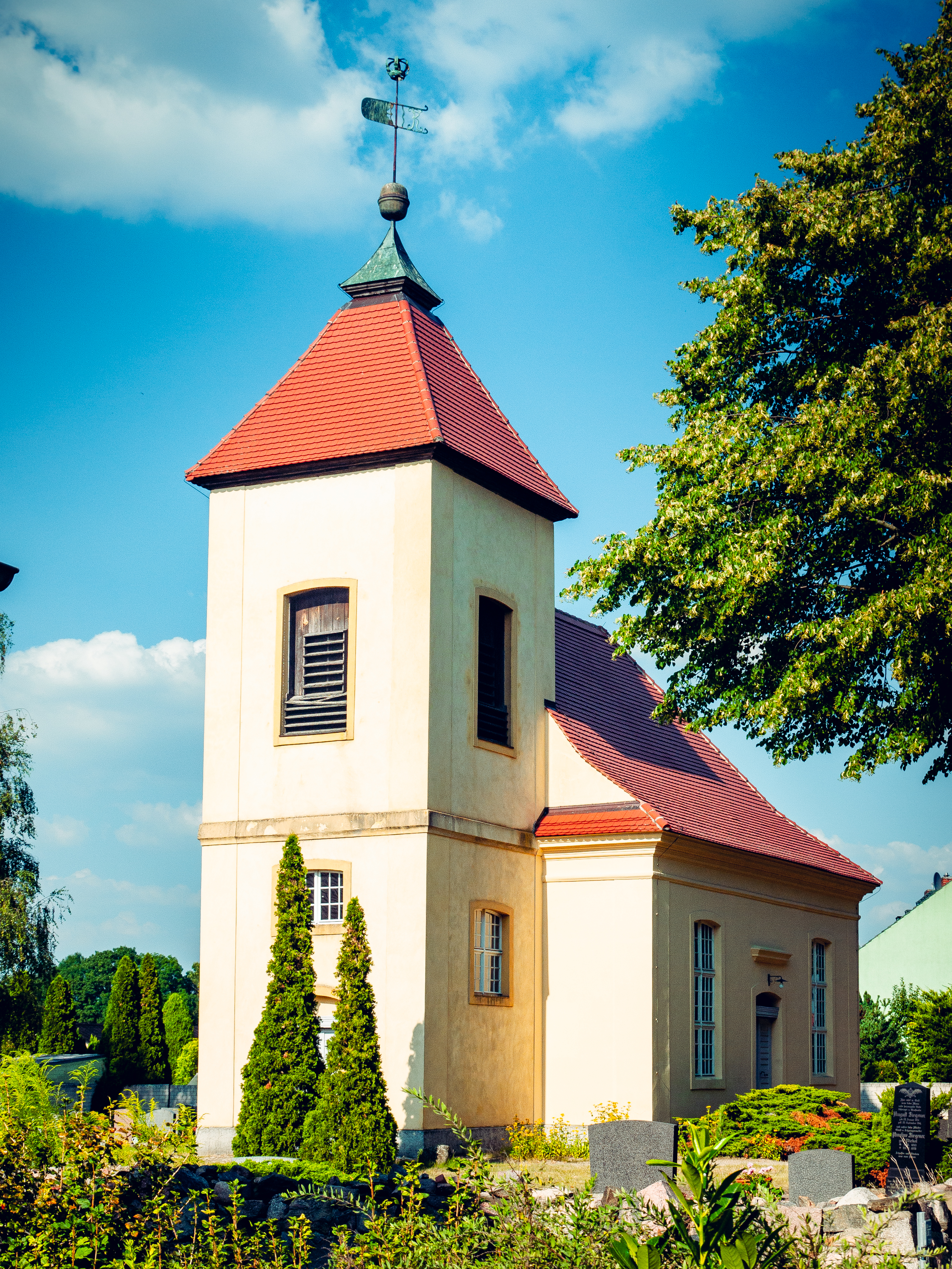 Dorfkirche Nudow, August 2020 A